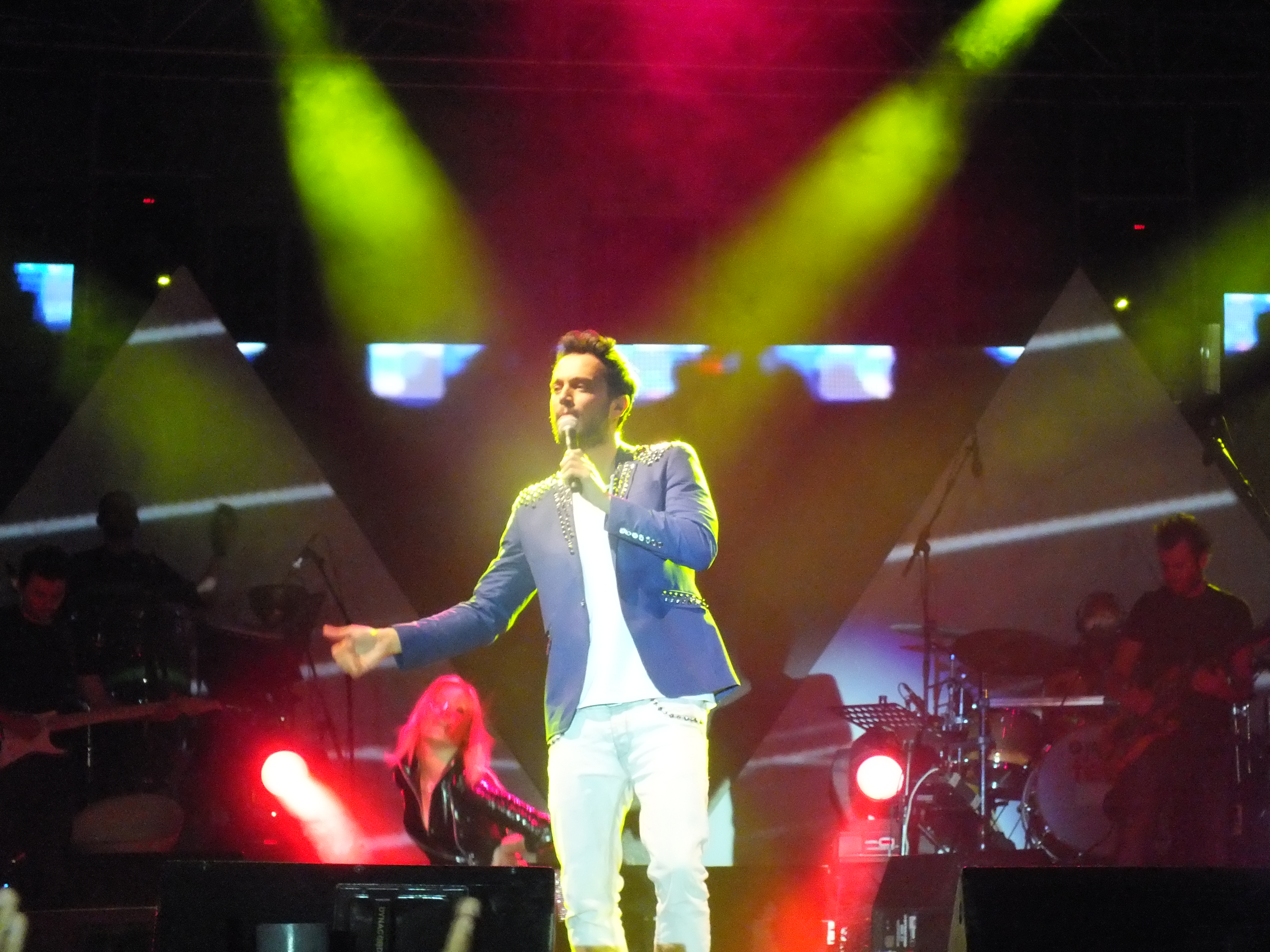 2012 Silifke Bahar Konserleri'nden bir kare.